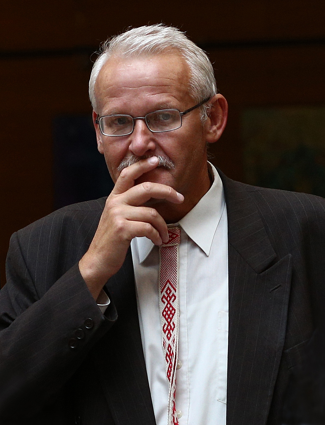 Беларуская (тарашкевіца): Язэп Янушкевіч — беларускі літаратуразнавец, археограф, пісьменьнік.